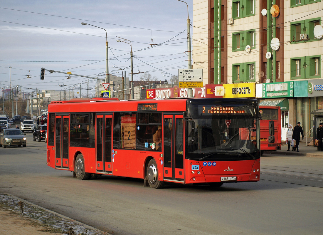 Новый автобус МАЗ-203 в Казани